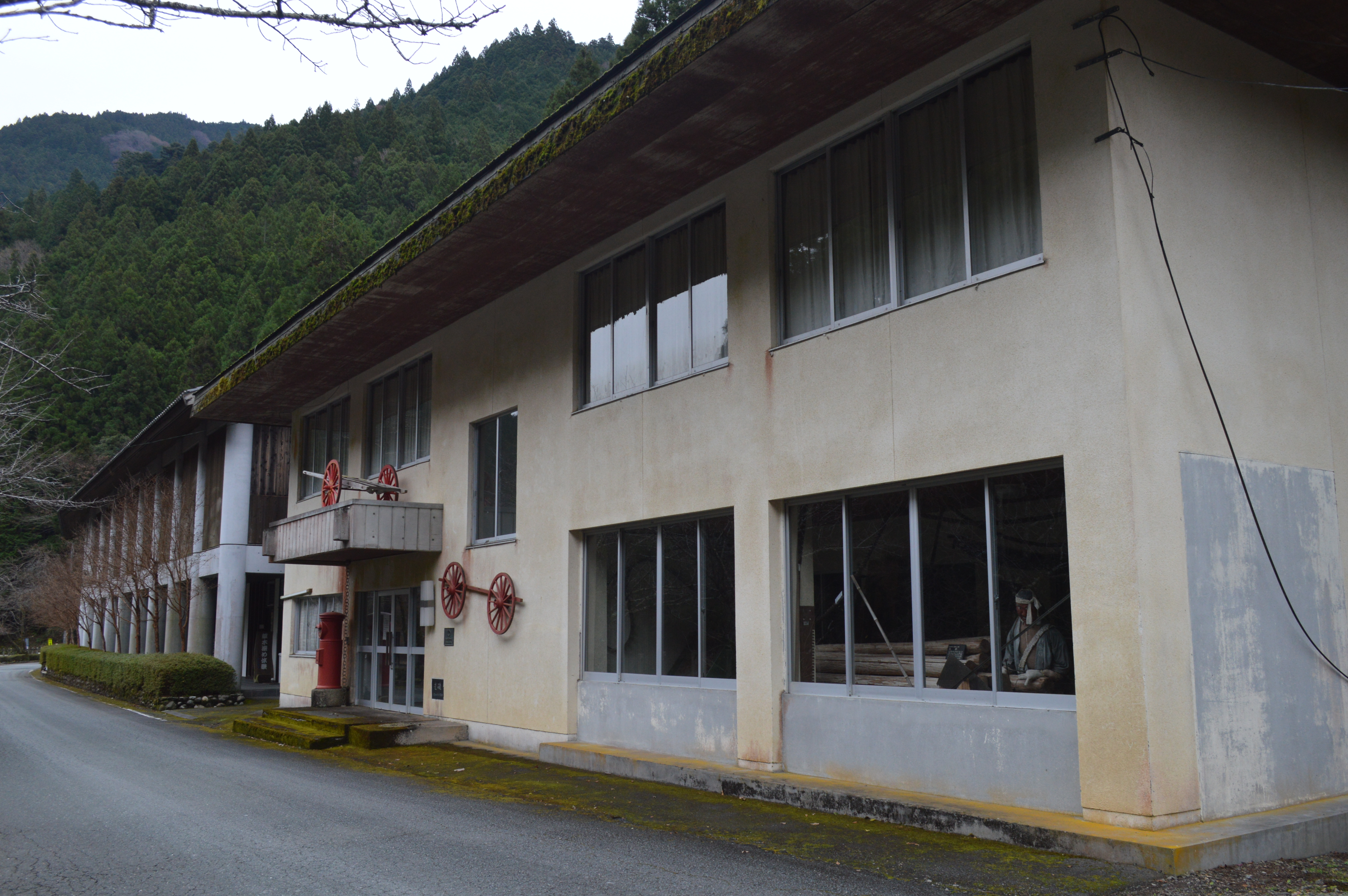 静岡県浜松市天竜区水窪町にある浜松市水窪民俗資料館の収蔵庫。